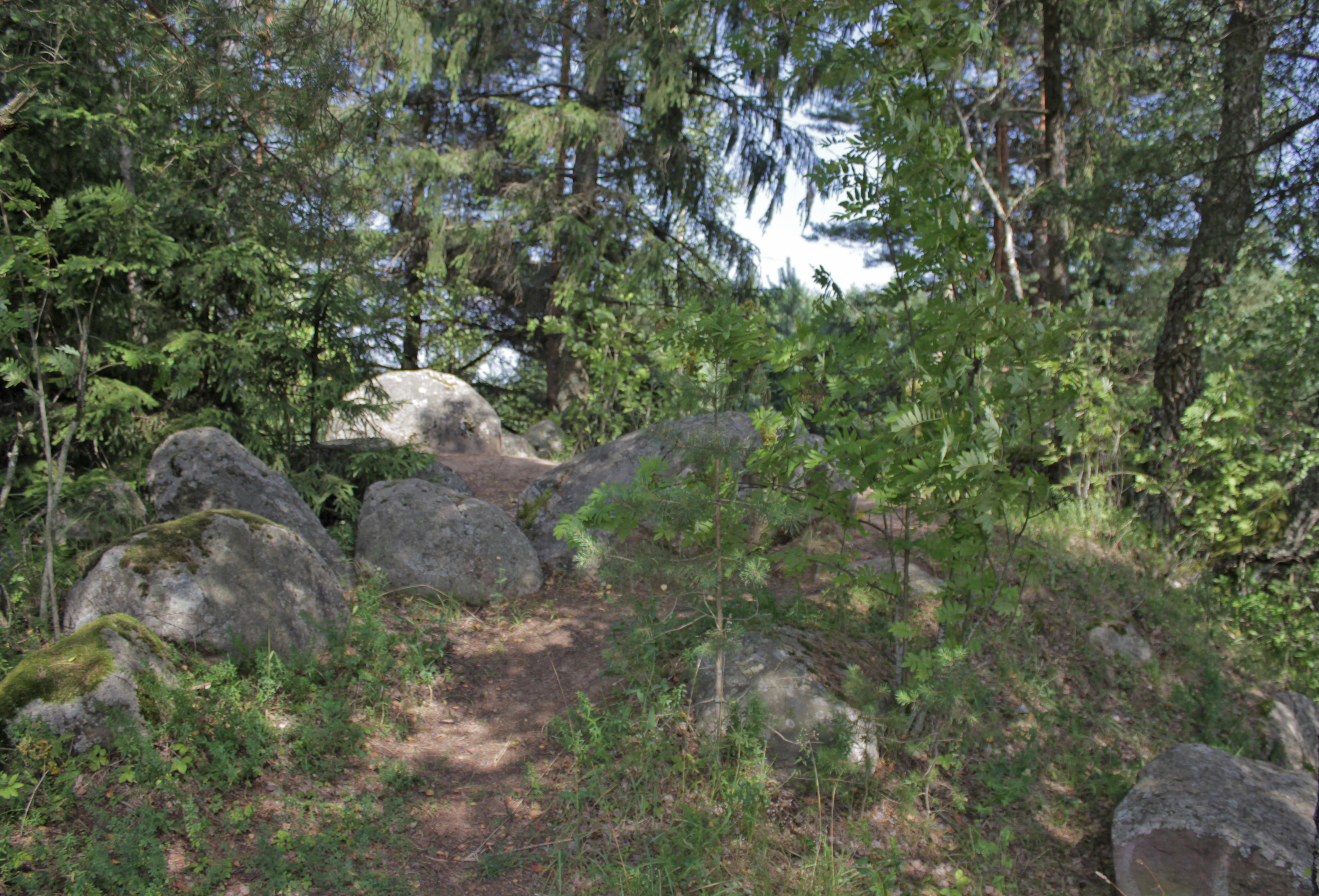 Akmenų kalnelio aikštelė